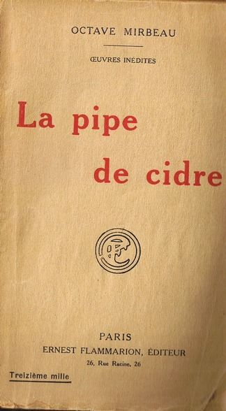 couverture de La Pipe de cidre, volume de contes posthumes d'Octave Mirbeau (1848-1917)